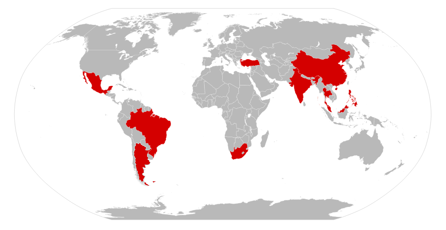 Países recientemente industrializados y economías emergentes.